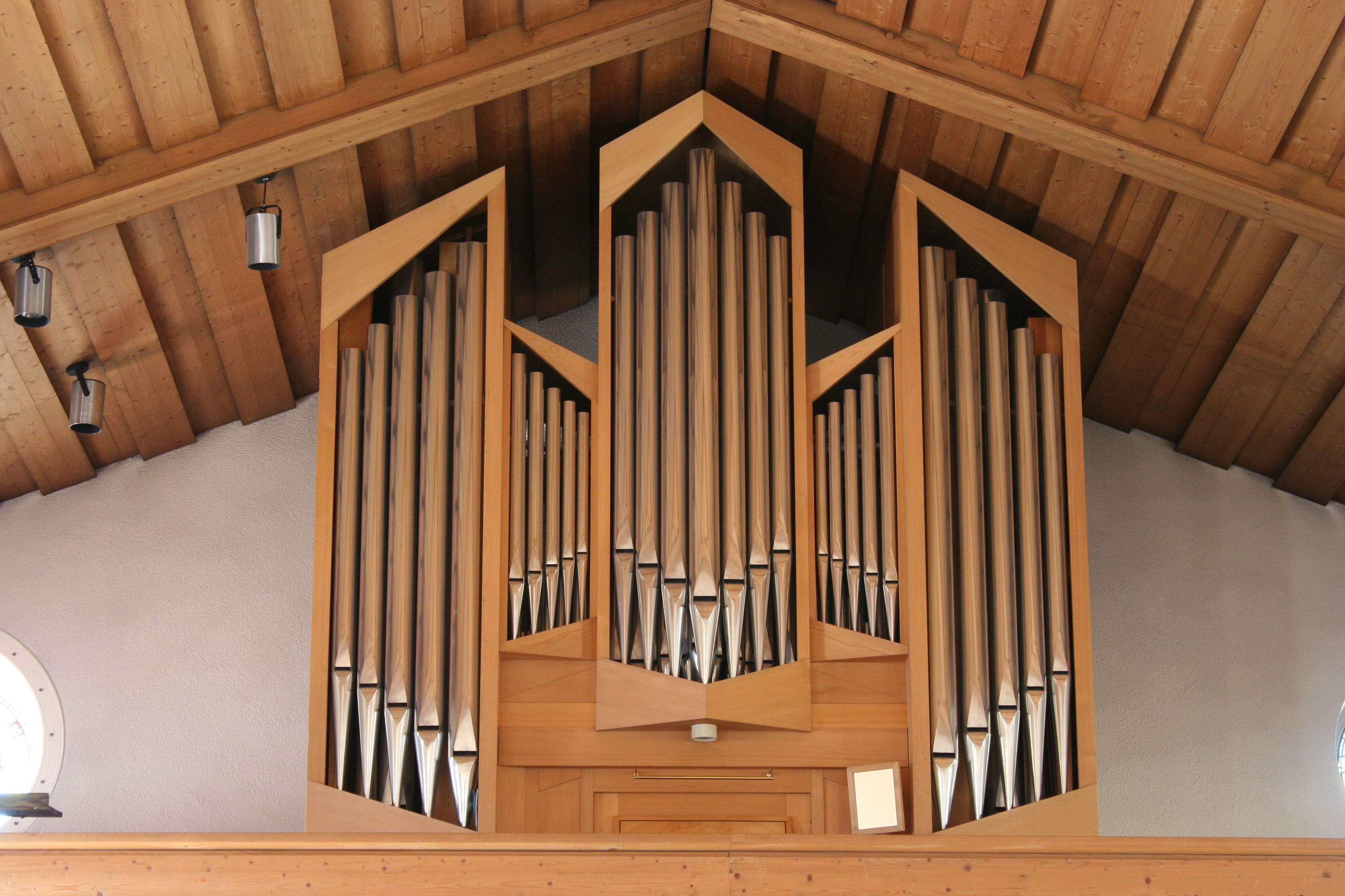 Römisch-katholische Pfarrkirche St. Antonius Kollbrunn, Ansicht von Nordwesten